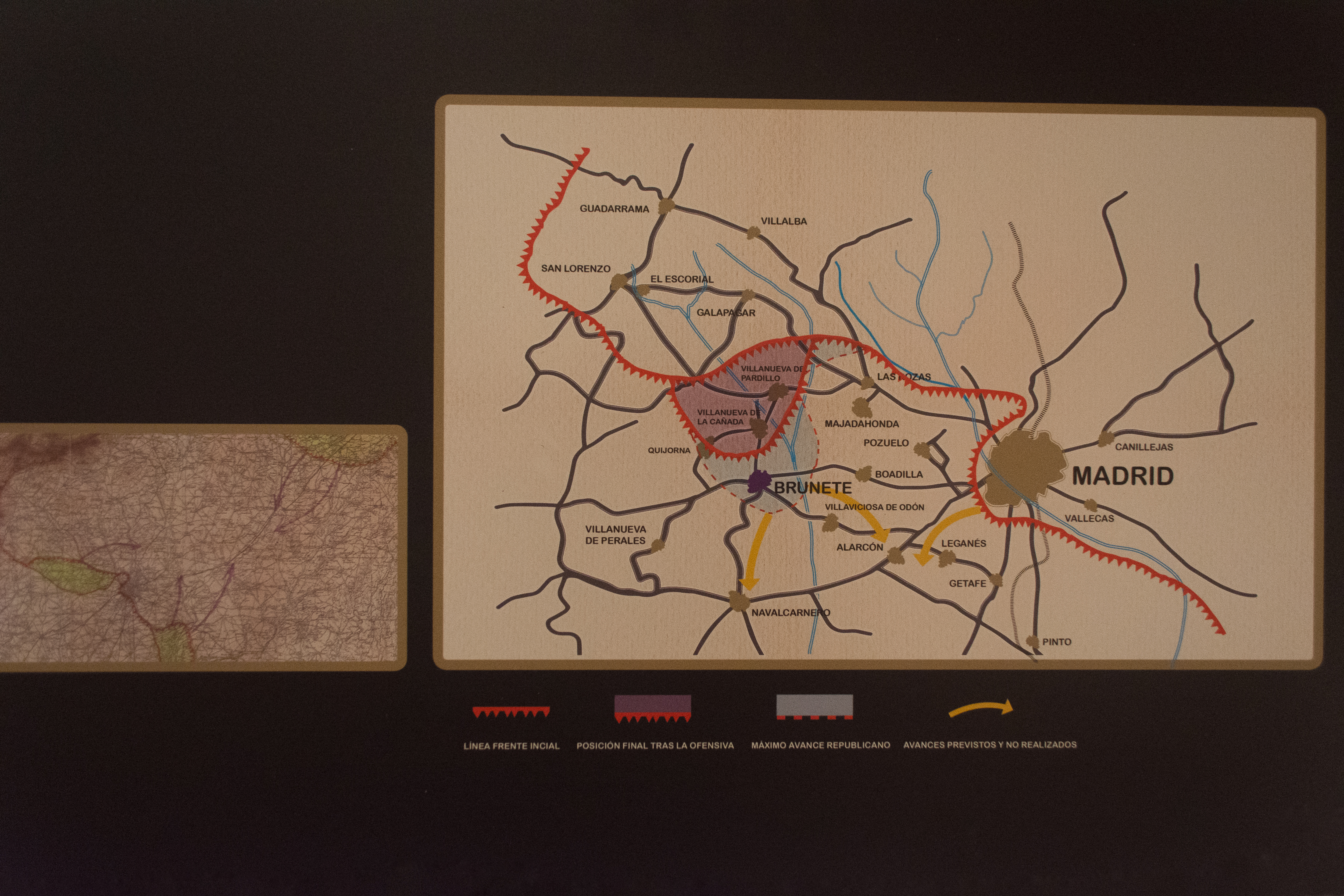 Esquema de la batalla de Brunete. Exposición Por la defensa de la Cultura en el Centro del Carmen de Valencia.